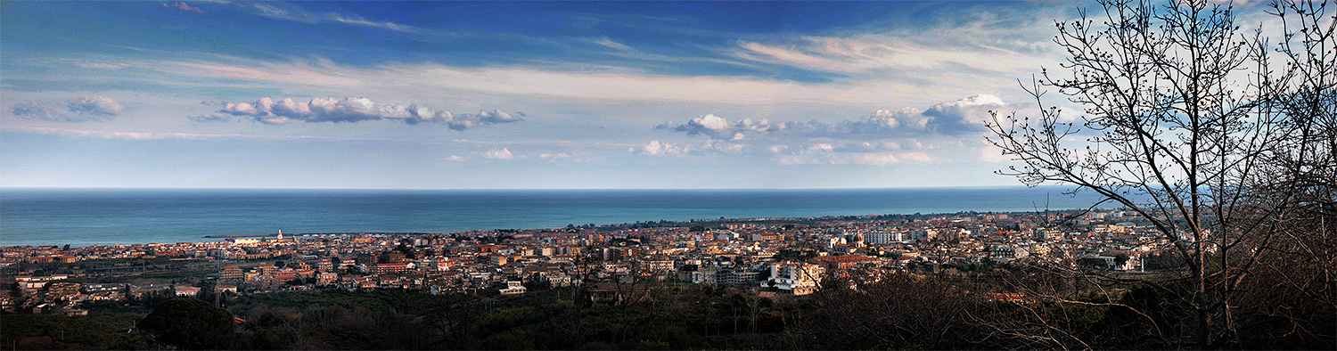 L'odierna conurbazione formata dai centri di Giarre e di Riposto